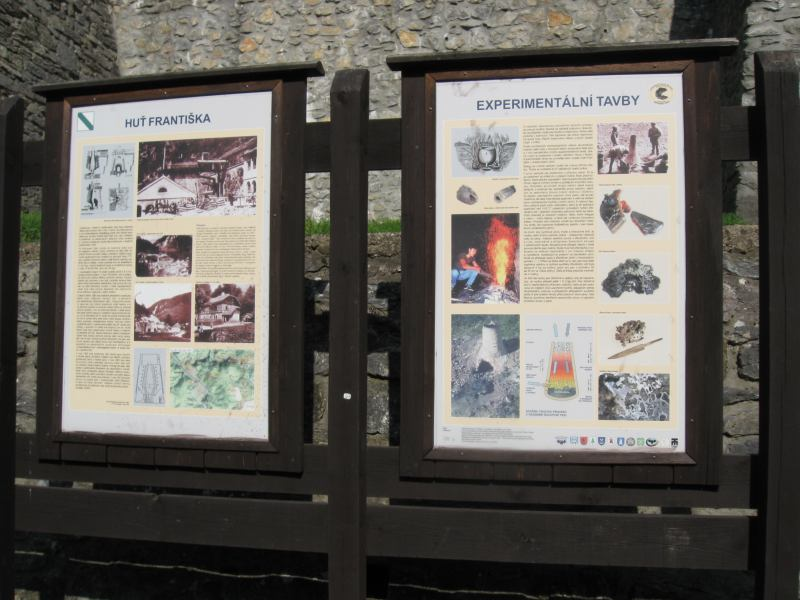 Huť Františka